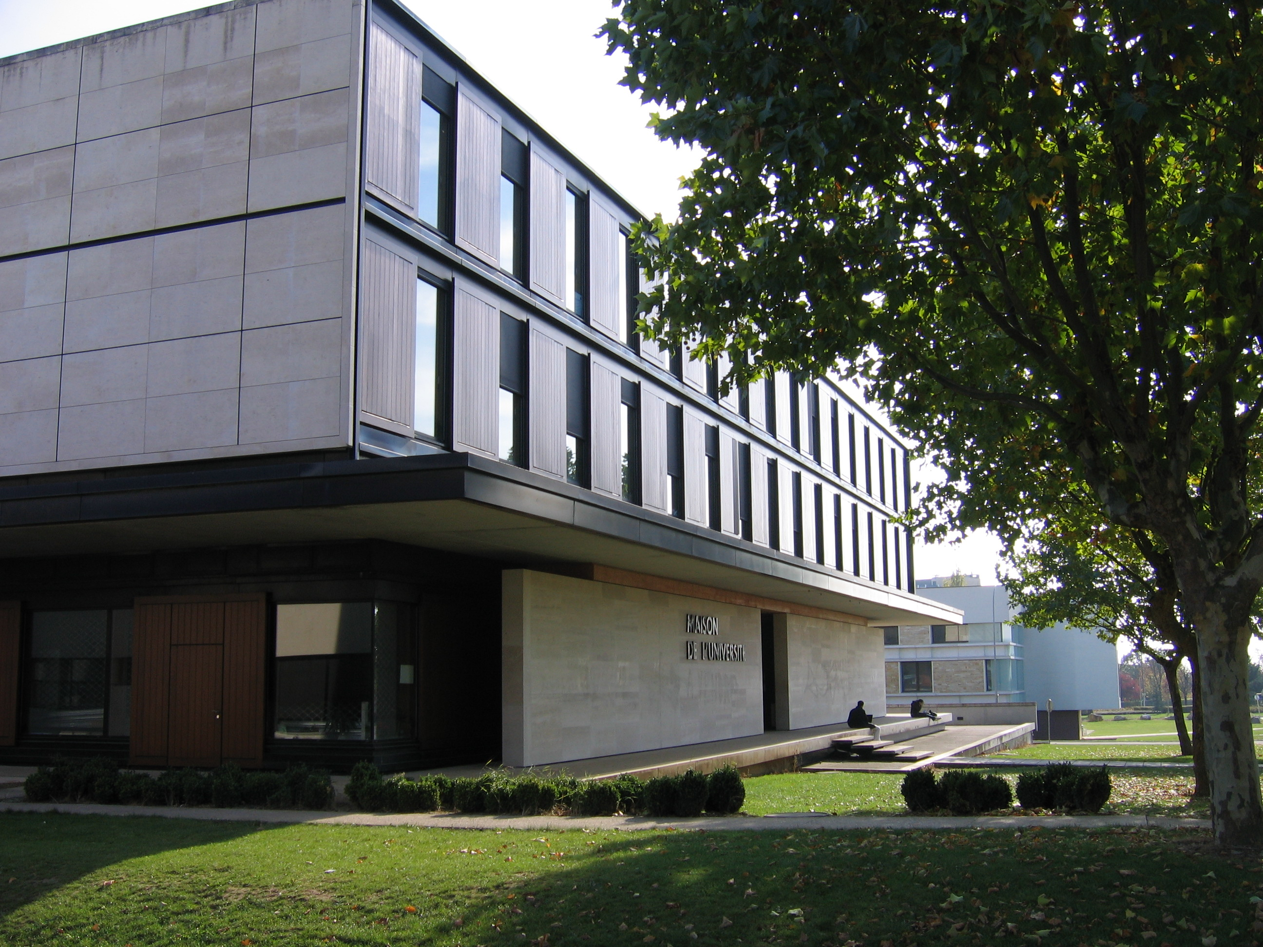 Maison de l'Université de Dijon (Université de Bourgogne - France)